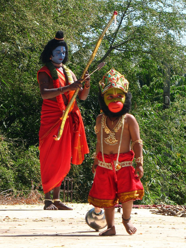 Ramlila artists.